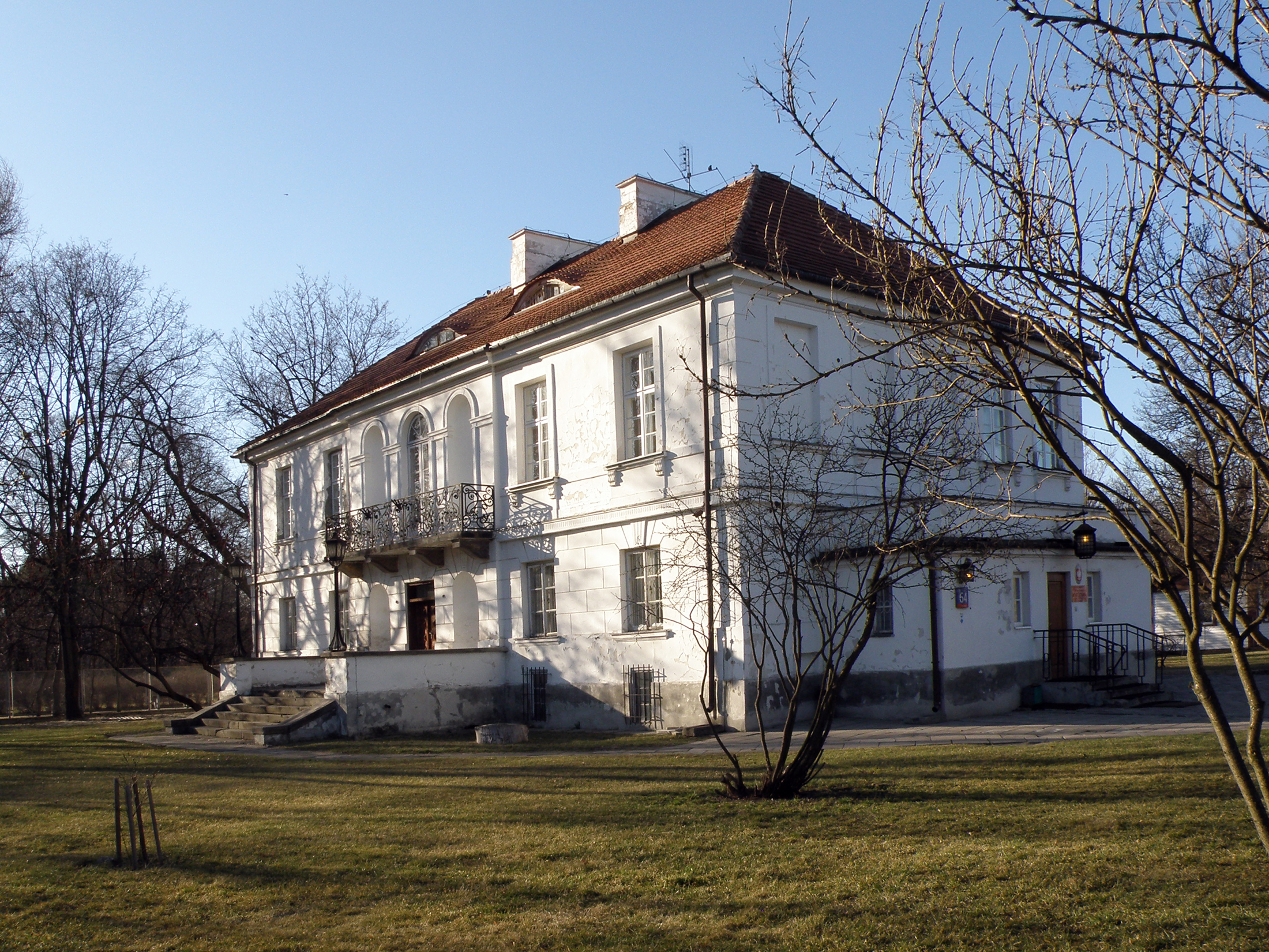 Dwór księcia Michała Poniatowskiego (Dworek Grochowski), Warszawa, Praga Południe